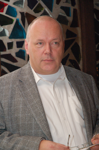 De Jean Nicolas.